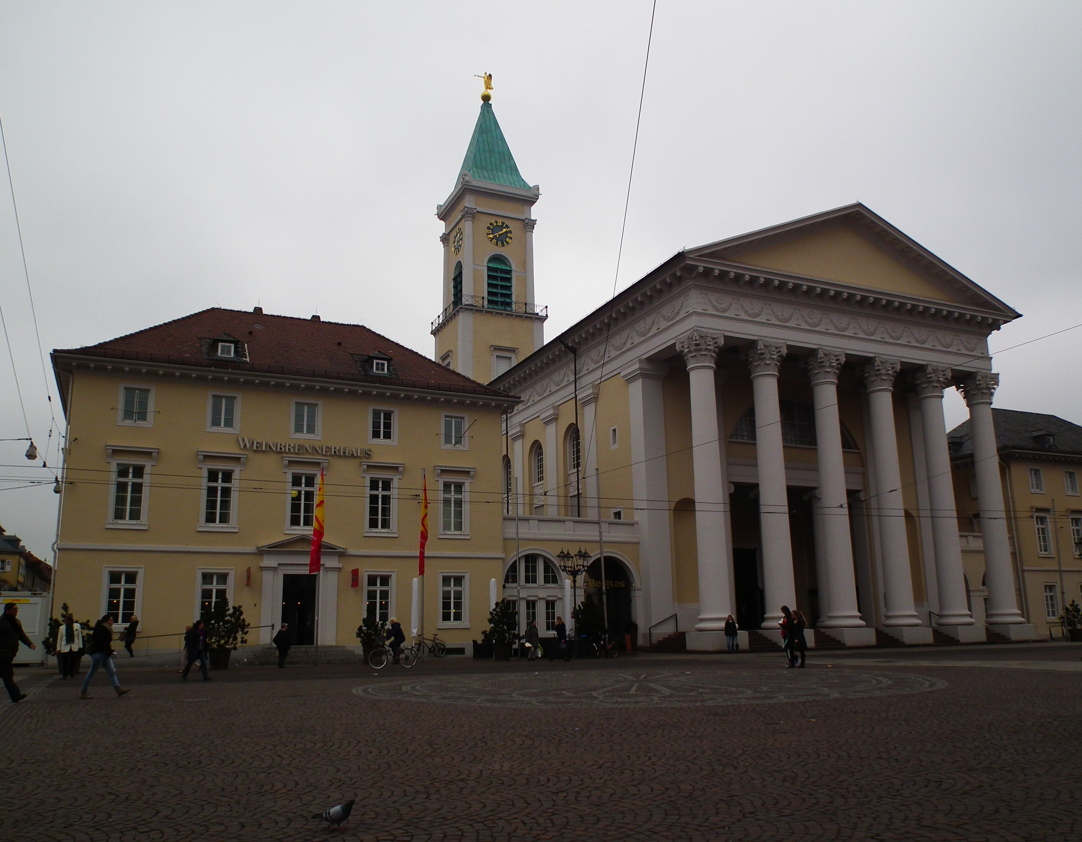 Weinbrennerhaus und evangelische Stadtkirche in Karlsruhe (Baden-Württemberg, Deutschland)